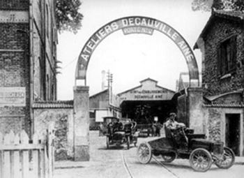 Ateliers Decauville aine